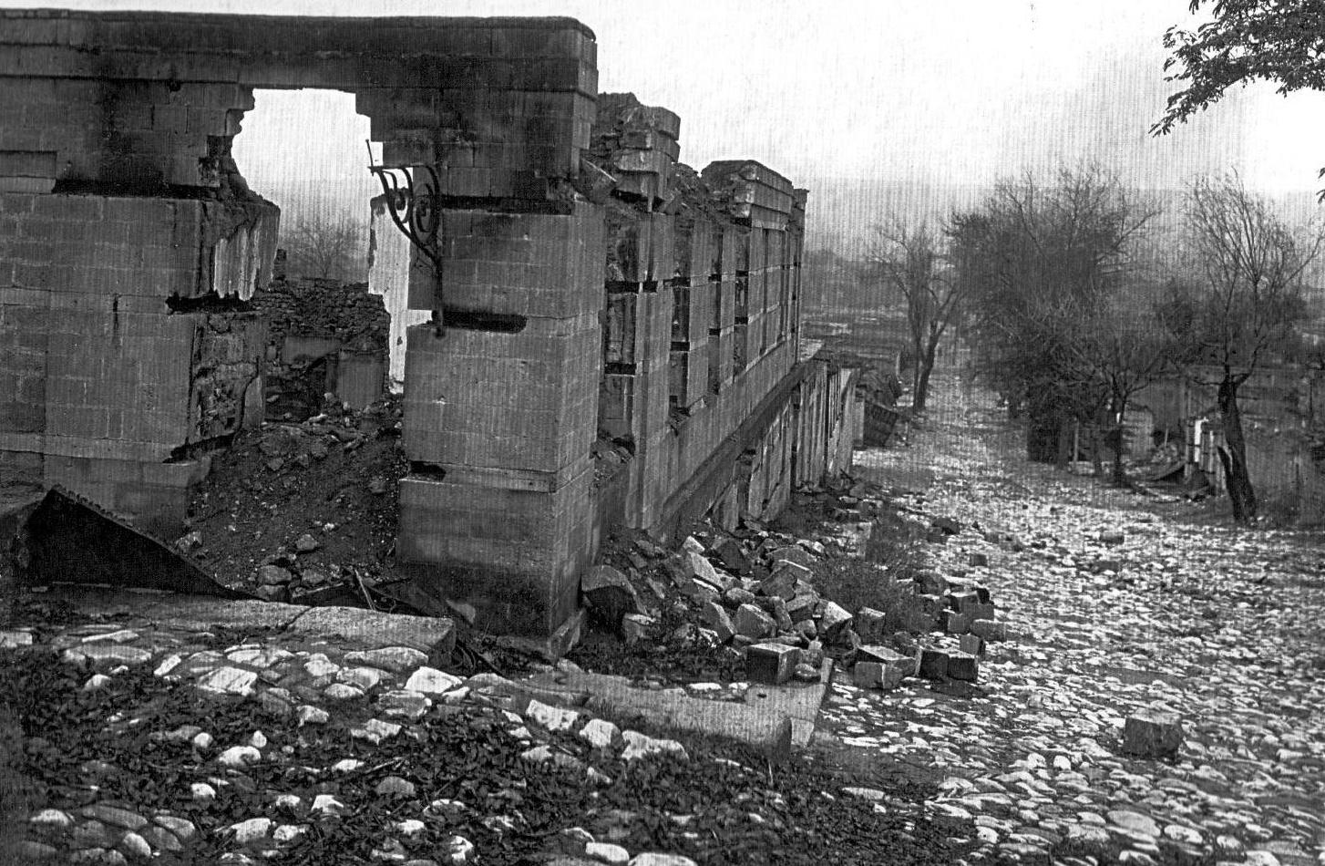 Kupeçeskaya küçəsində Hacı Həsənin evinin dağıntıları